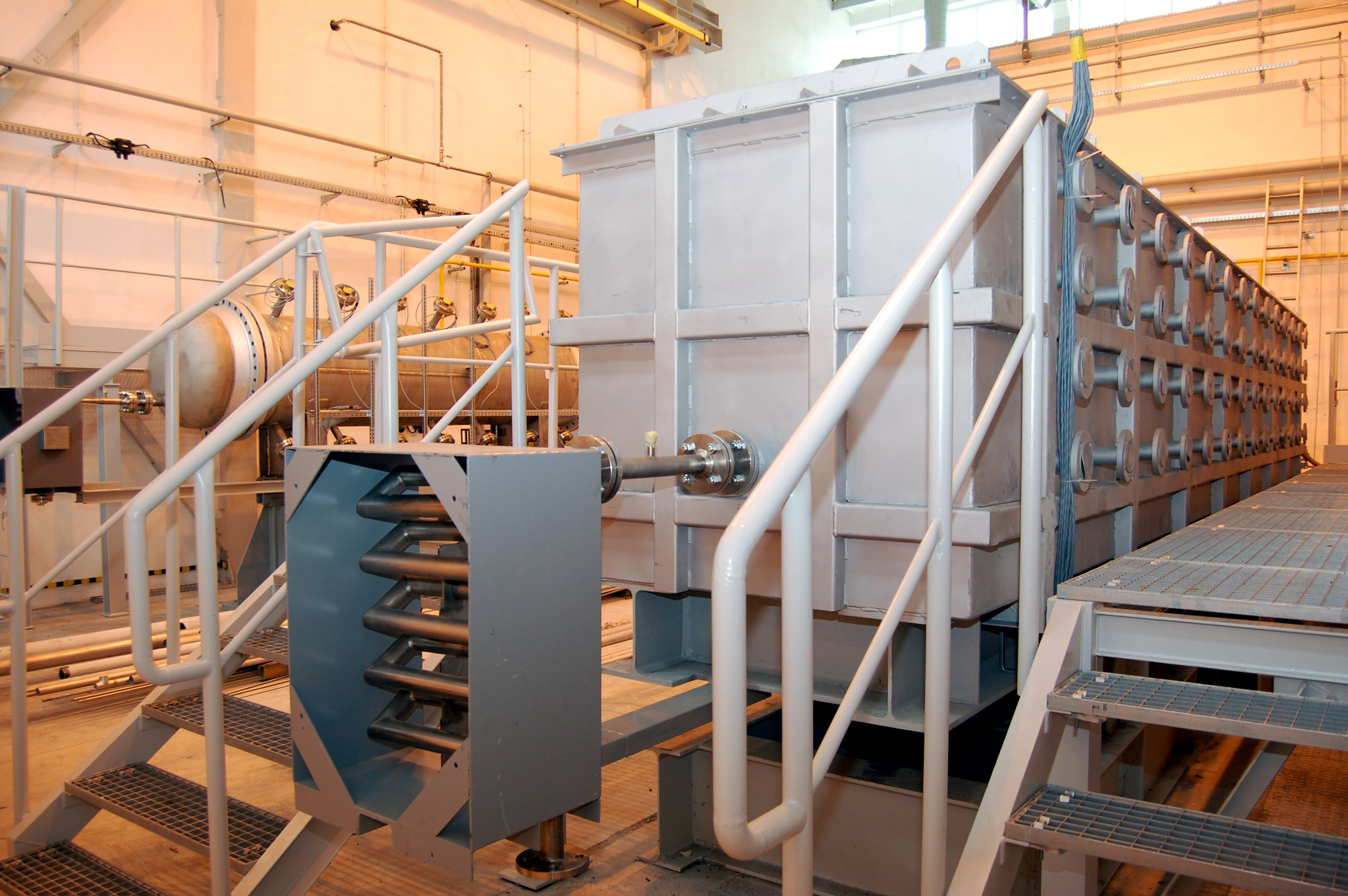 Instalacje Kopalni Doświadczalnej "Barbara"2